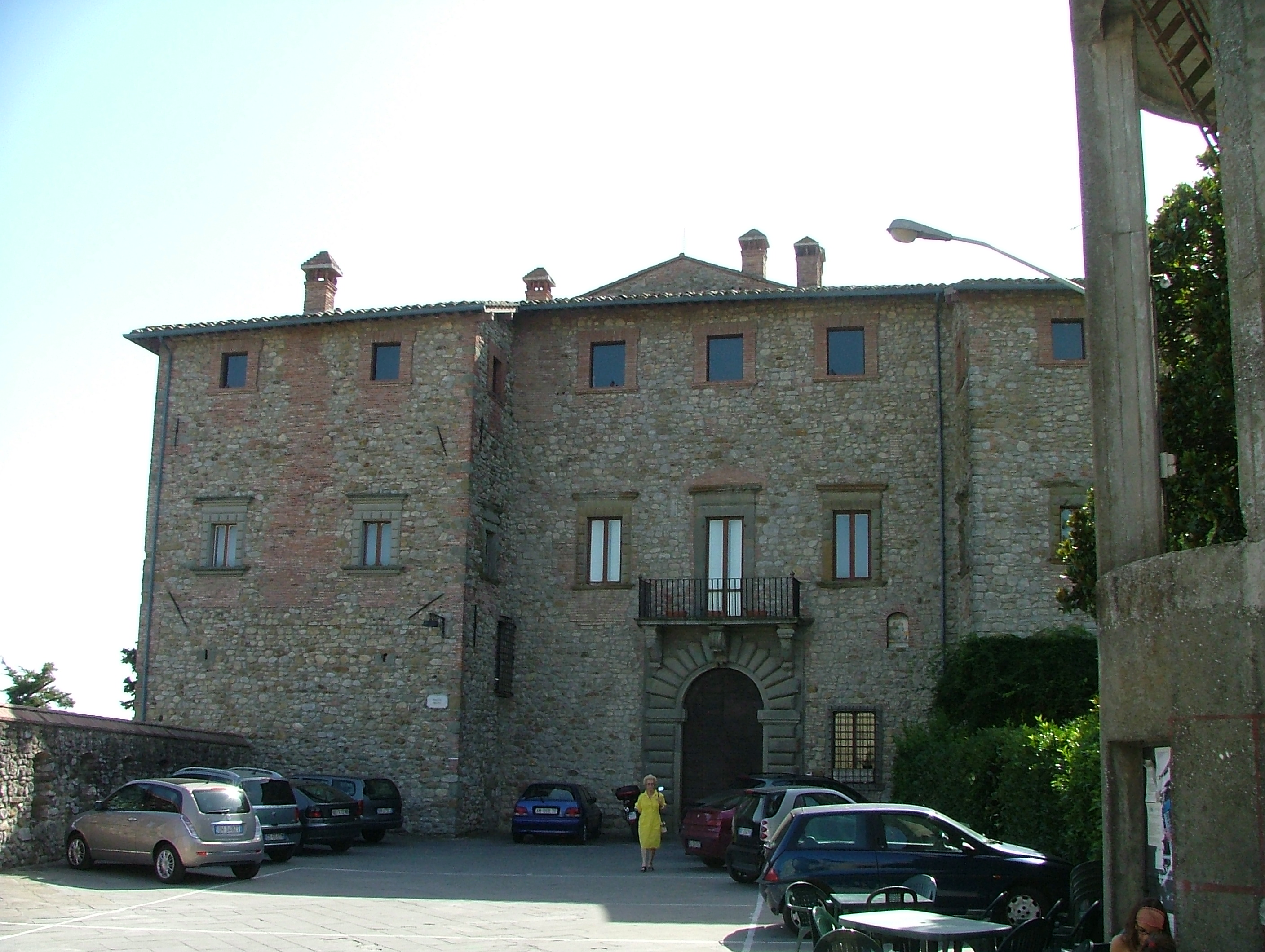 Castello di Carnaiola - Fabro (TR), un tempo feudo dei Conti di Marsciano